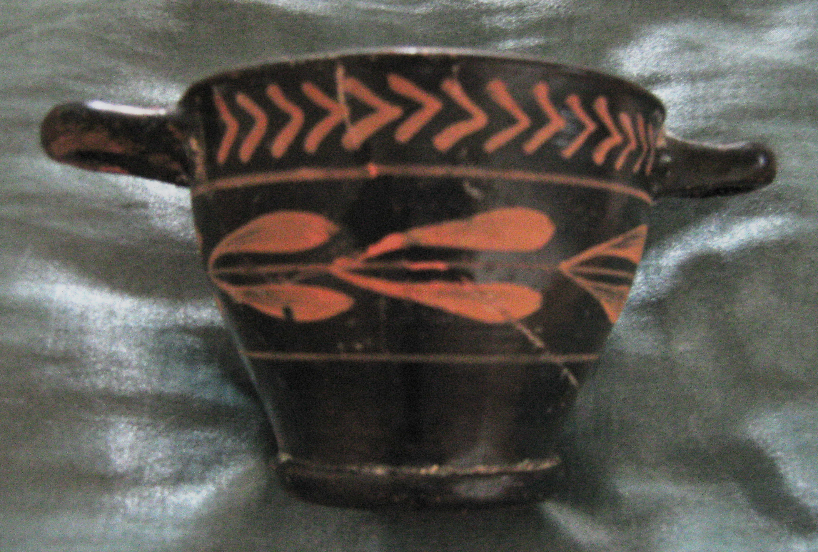 Small ancient apulian Skyphos Xenon style, 4th Century BC, German private Collection